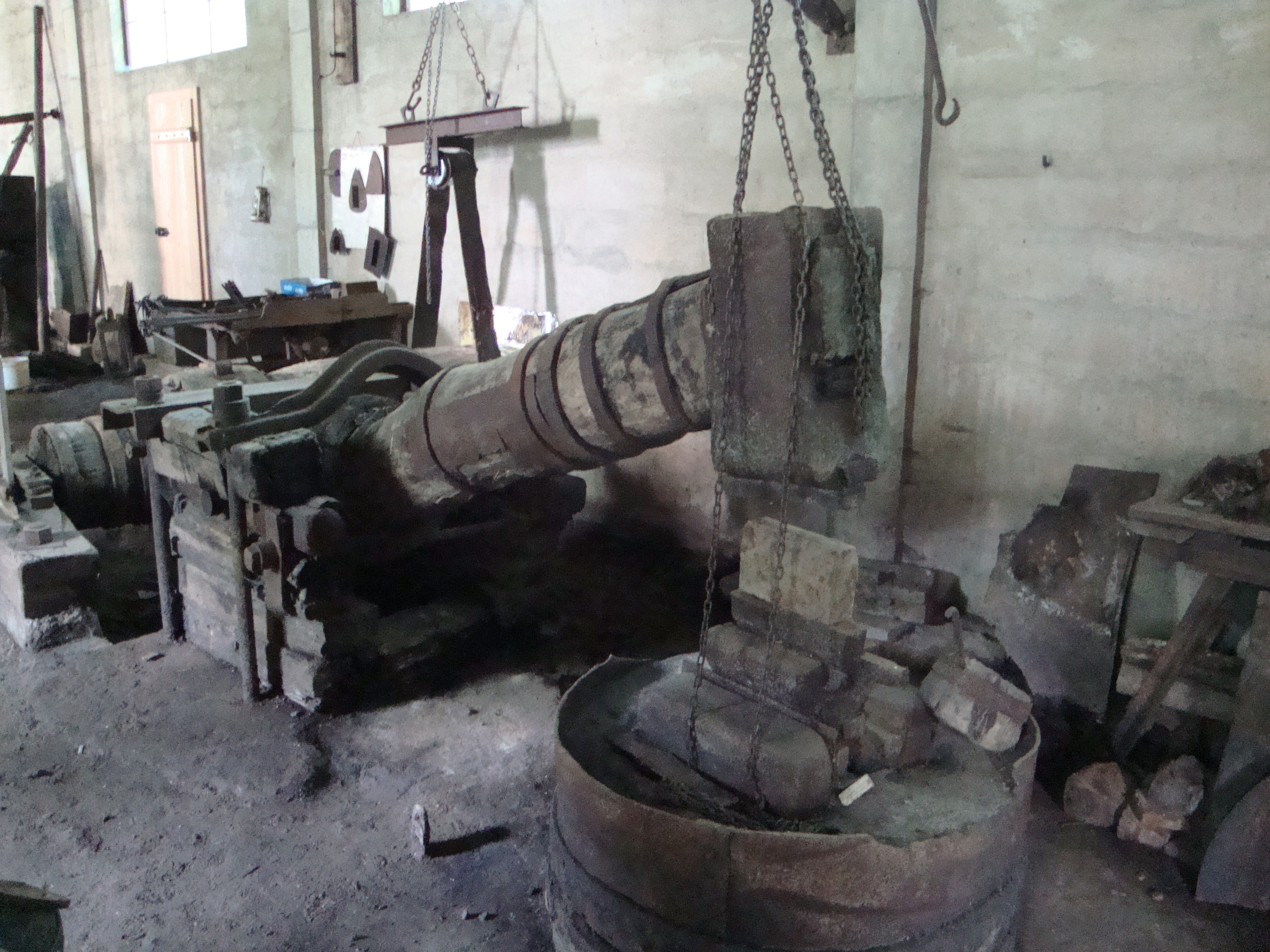 Hammerwerk Roob/Roobhammer